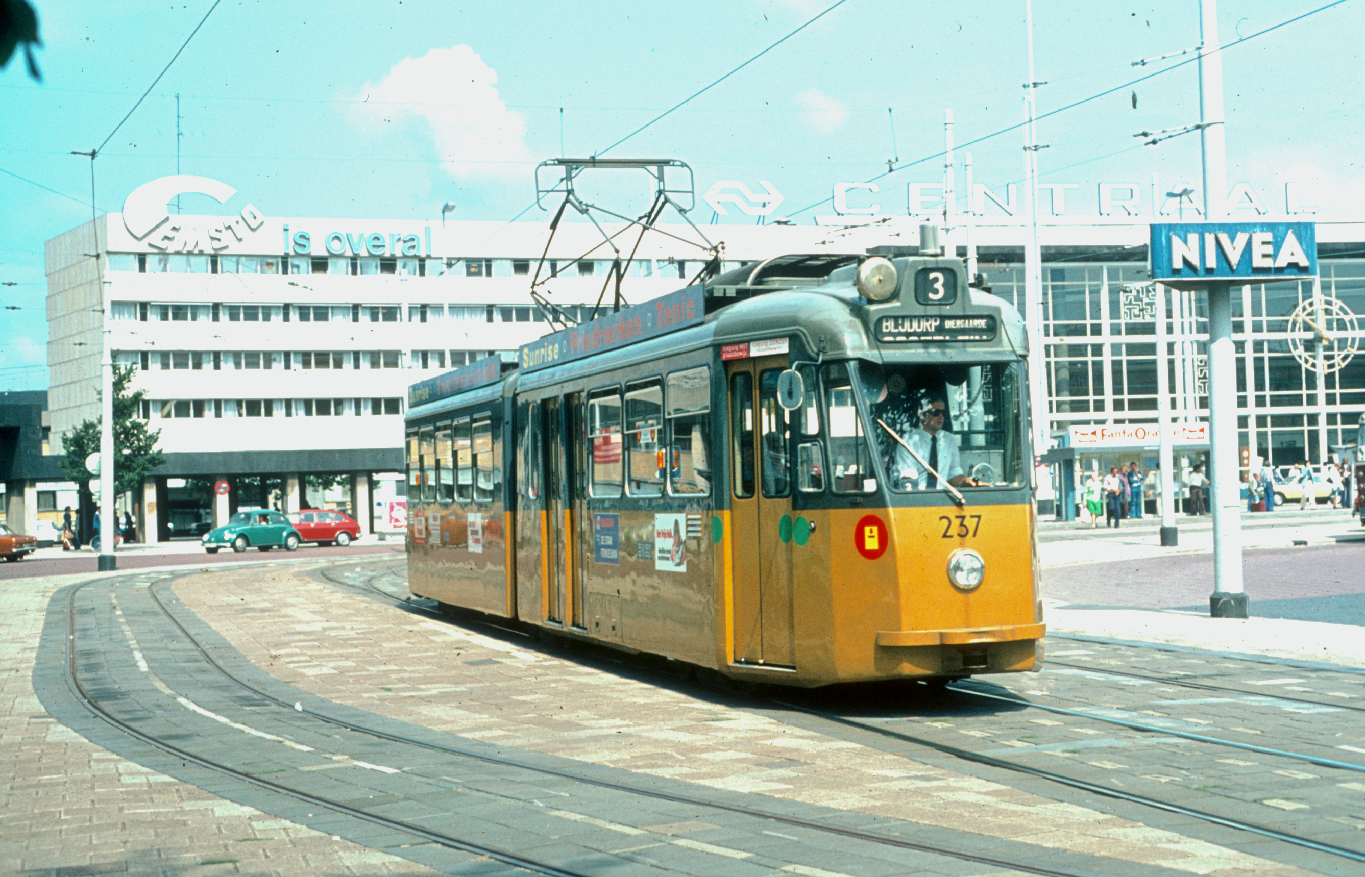 Rotterdamse Elektrische Tram N.V. (RET), Schindler tram 237 te Rotterdam.